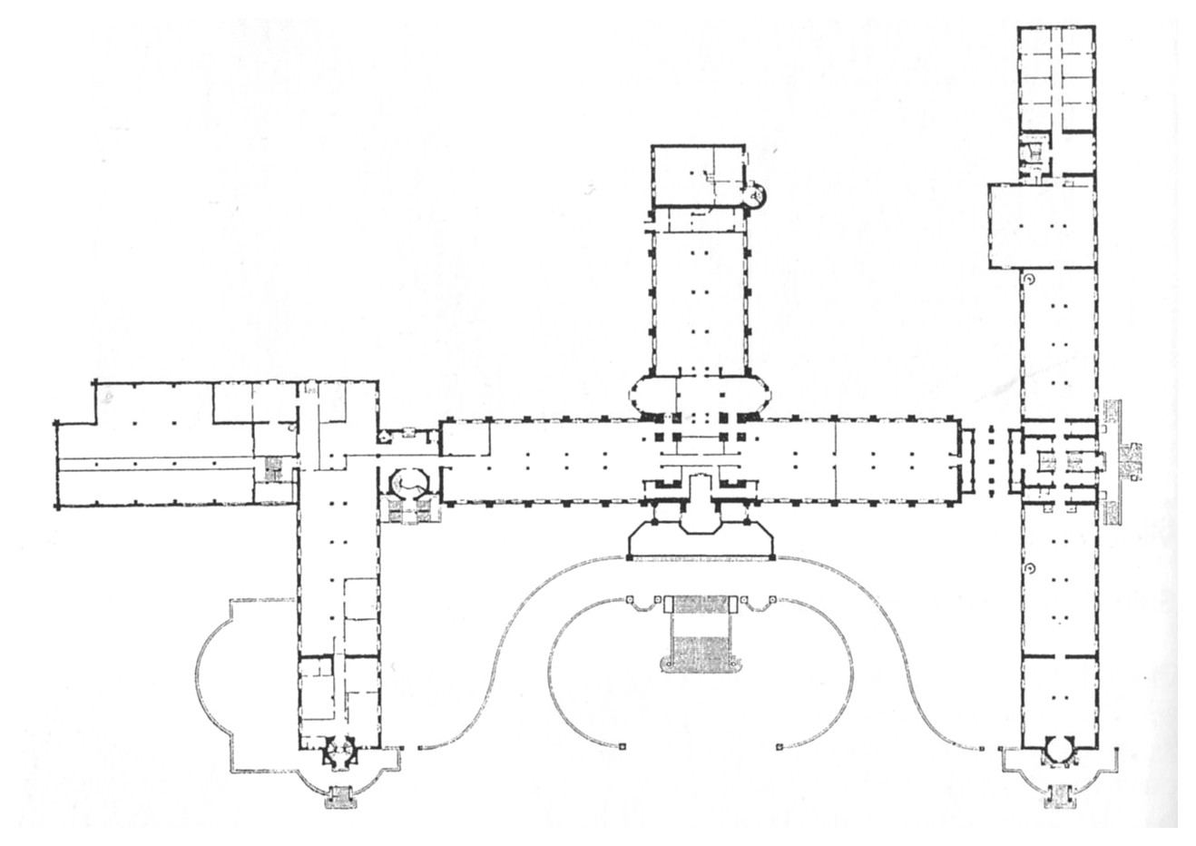 Naturhistoriska Riksmuseum, planritning